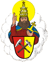 Znak města Boží Dar